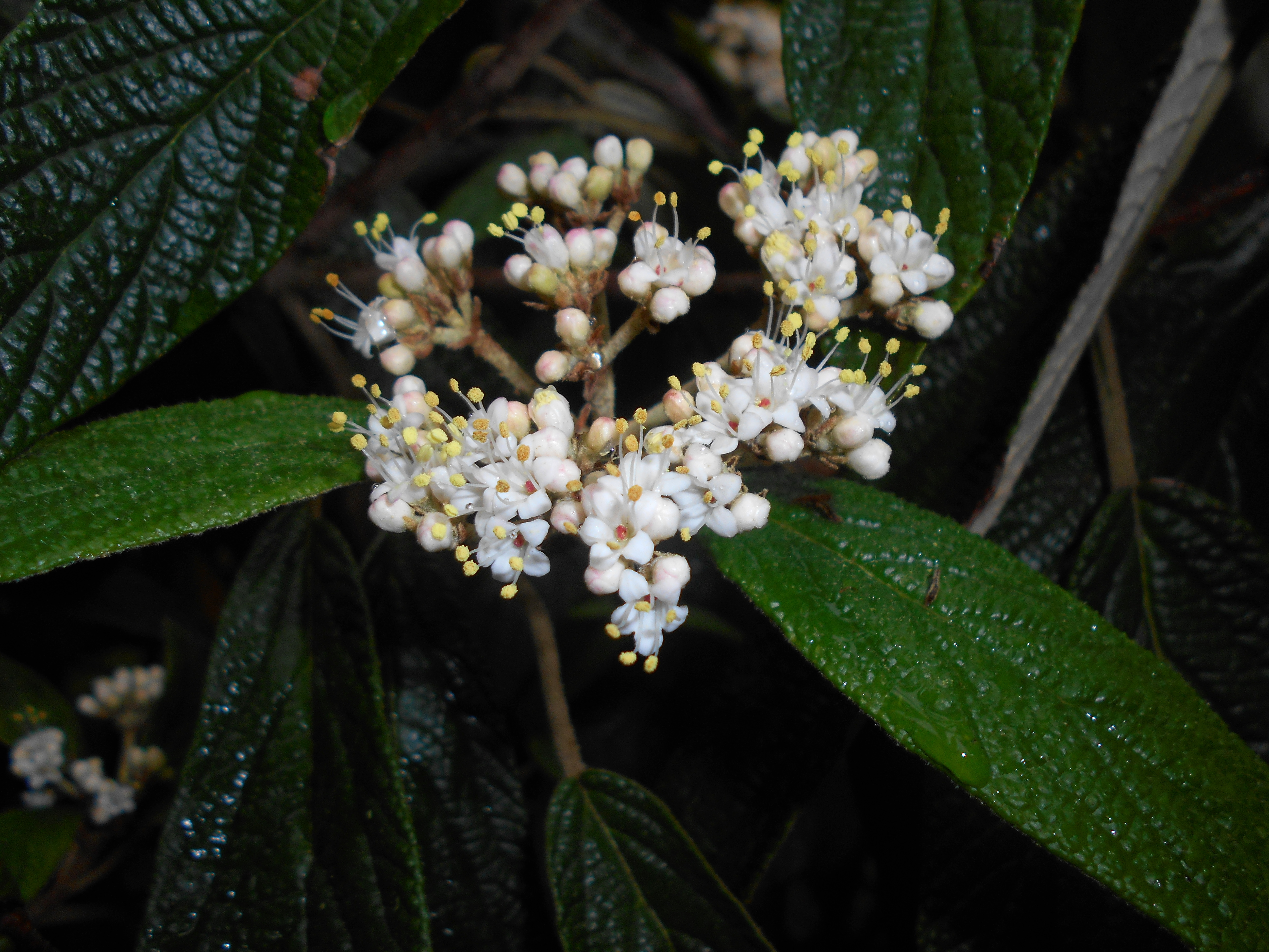 Kalina sztywnolistna (Viburnum rhytidophyllum), Ogród Botaniczny UMCS w Lublinie.